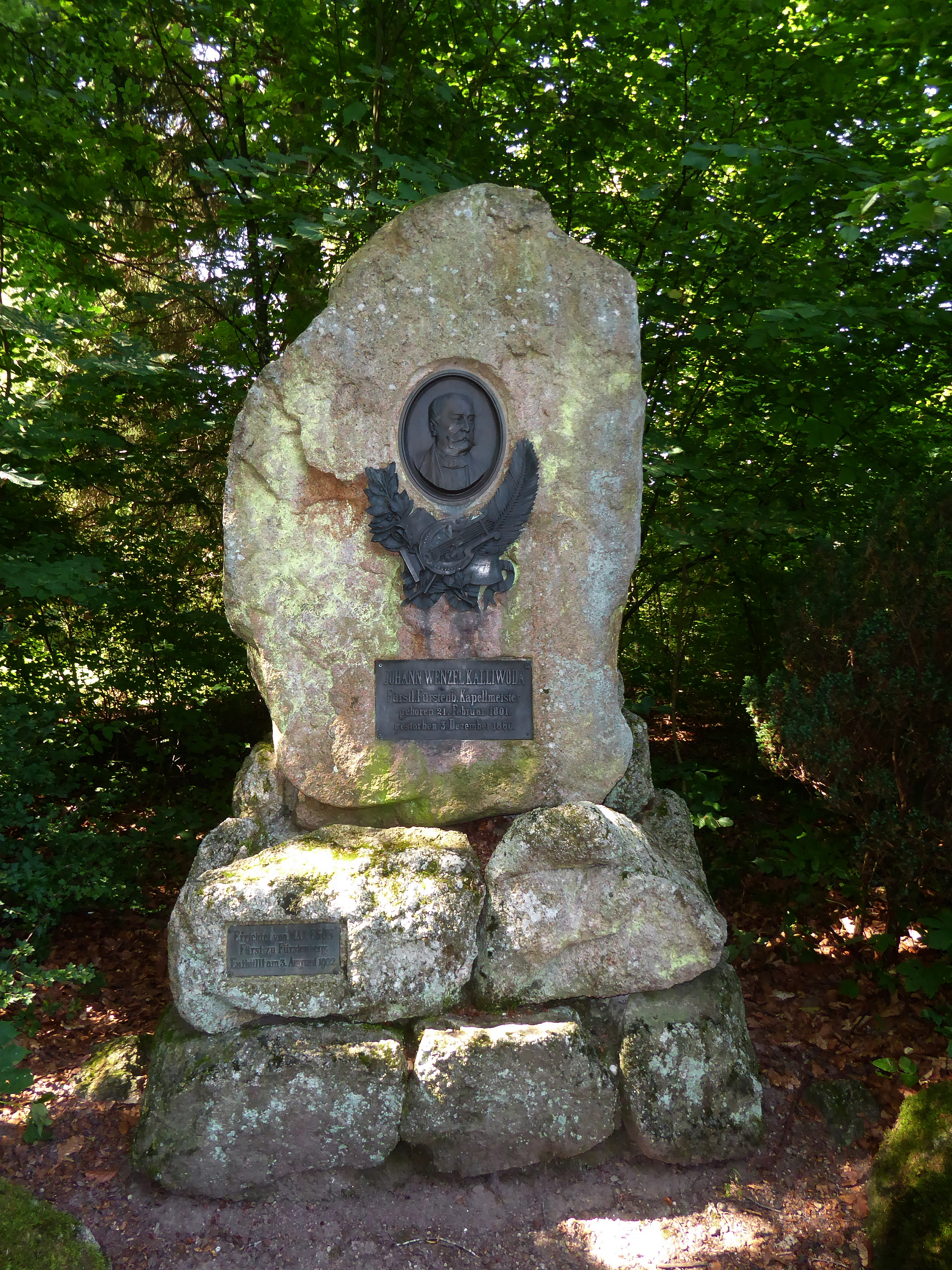 Johann Wenzel Kalliwoda (1801–1866) Kapellmeister, Denkmal enthüllt am 3. August 1902, errichtet von Max Egon, Fürst zu Fürstenberg (1863–1941), Standort: Donaueschingen im Fürstlich Fürstenbergischen Park. 47°56'52.6"N 8°30'21.6"E, 47.947947, 8.506000